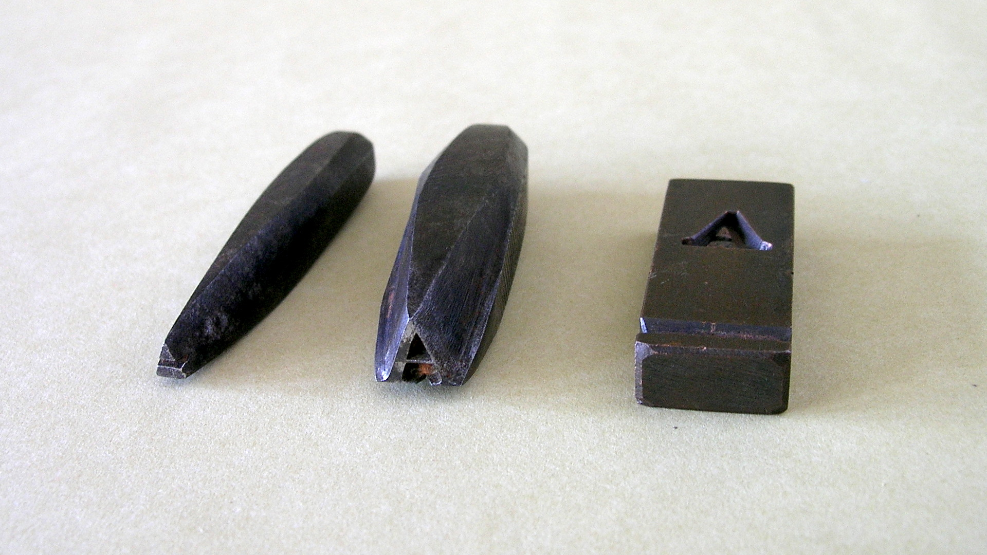 Punzón, contrapunzón y matriz perteneciente a una antigua póliza de Bodoni, gentileza de la Universidad de Barcelona